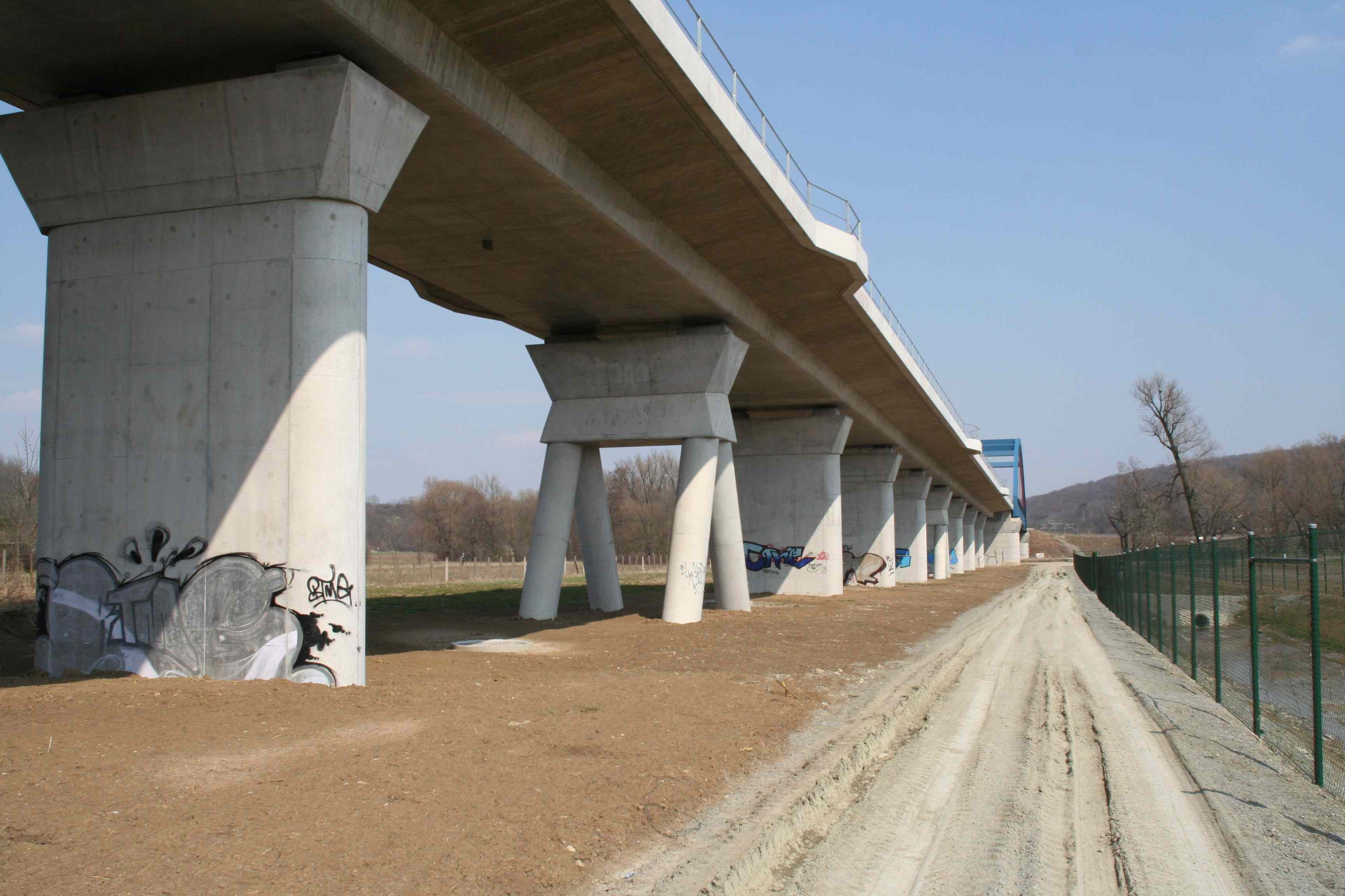 Geratalbrücke Bischleben Eisenbahnstrecke NBS Ebensfeld–Erfurt